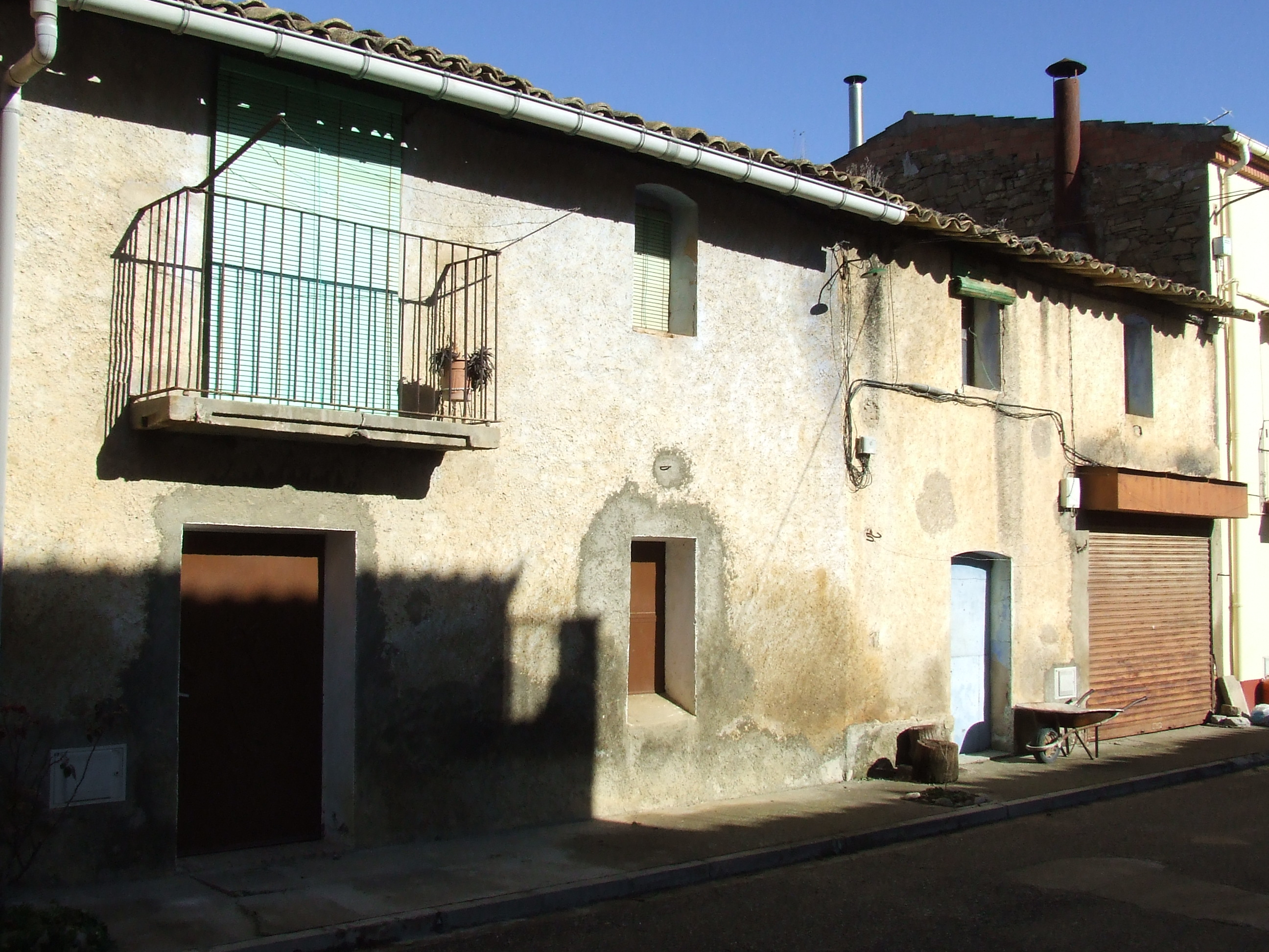 Cases originals del segle XIX, a Puigcercós (Palau de noguera, Tremp, Pallars Jussà)